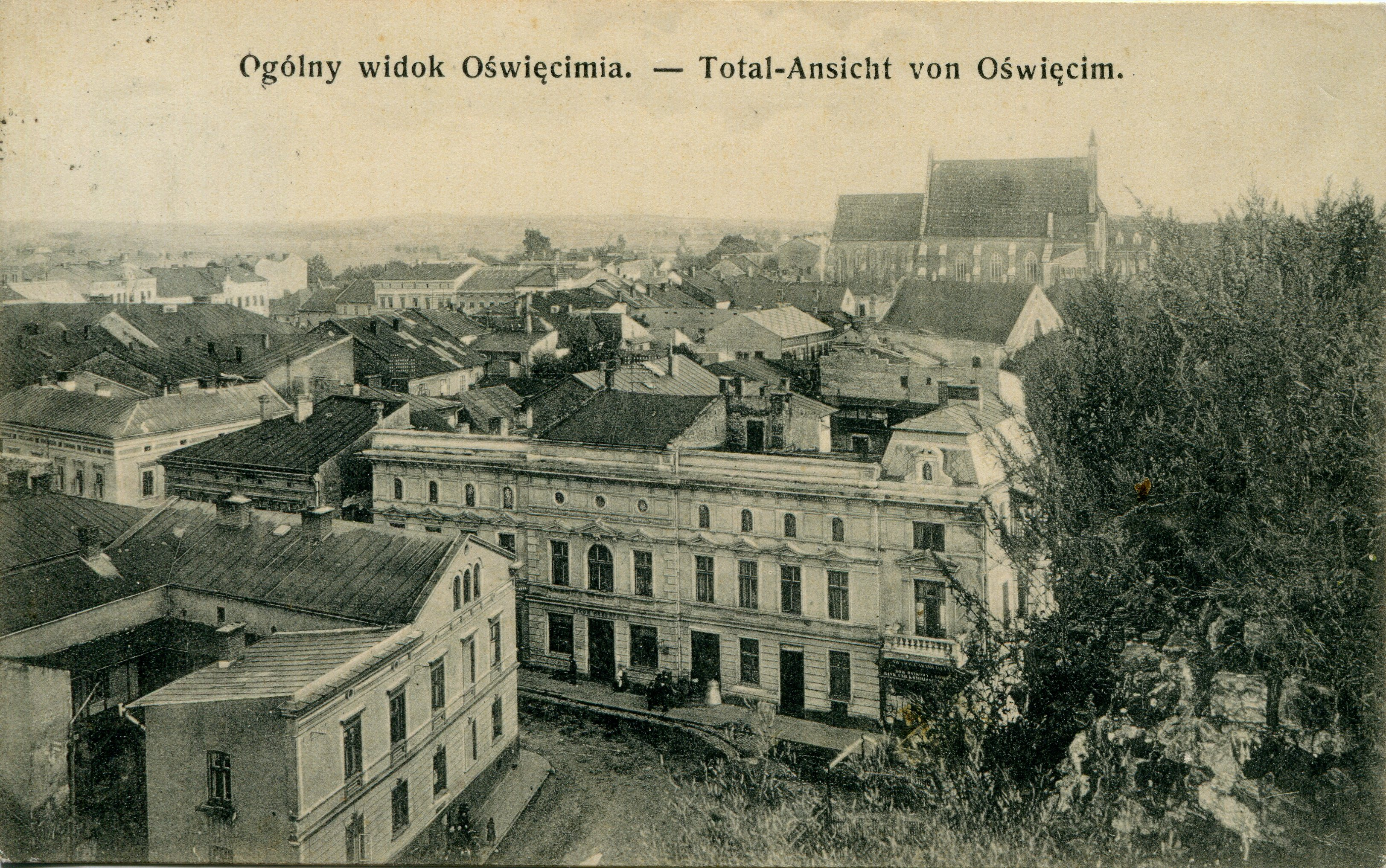 Oświęcim. Na pierwszym planie kamienica rodziny Haberfeldów, mieszcząca się tuż obok zabudowań fabrycznych. Zbiory: Łukasz Szymański. Karta pocztowa.